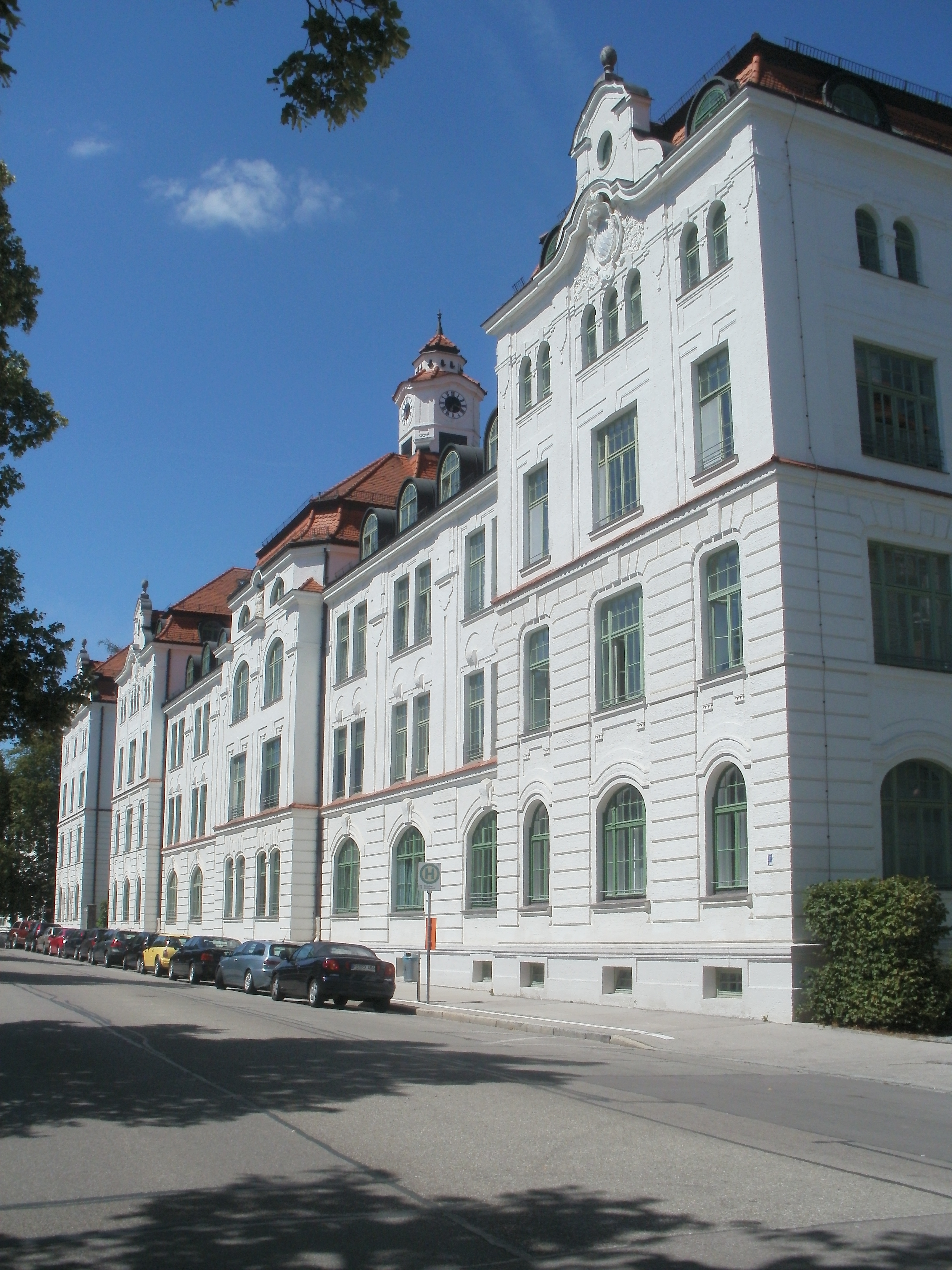 Vimy-Kaserne in Freising